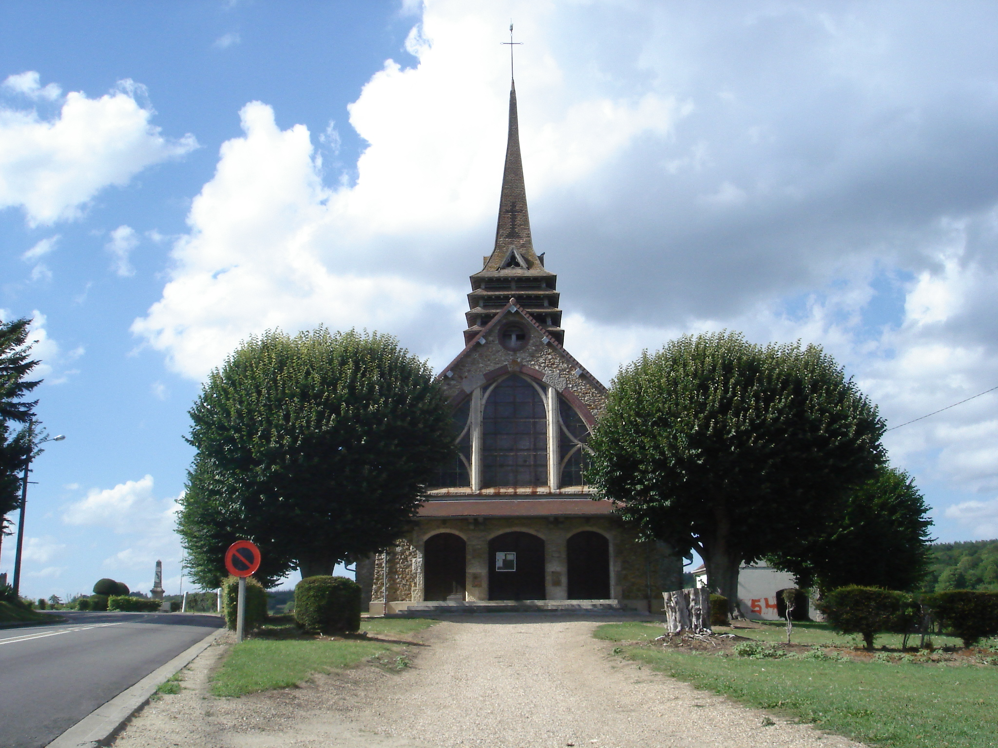 Ville de Blaru se trouvant dans les Yvelines (France) - 2006. Auteur : Jean-Claude Perez